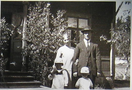 Lilla Ängby gård på Blackebergsvägen i Blackeberg i Bromma, väster om Stockholm. Torpstugan ligger vid gränsen till Södra Ängby och ligger utmed 1600-talets landsväg mellan huvudstaden och färjeläget vid Tyska Botten. Här syns trädgårdsmästare Gustav Andersson och hans hustru med barn. Familjen Andersson arrenderade gården. Foto Bromma Hembygdsförenings arkiv.